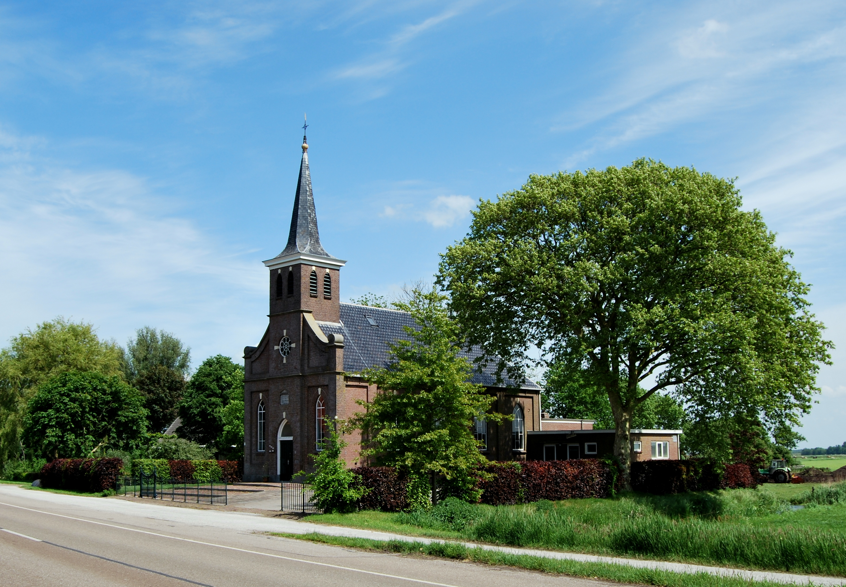 Dolfsterhuzen, protestanske tsjerke oan de Marwei